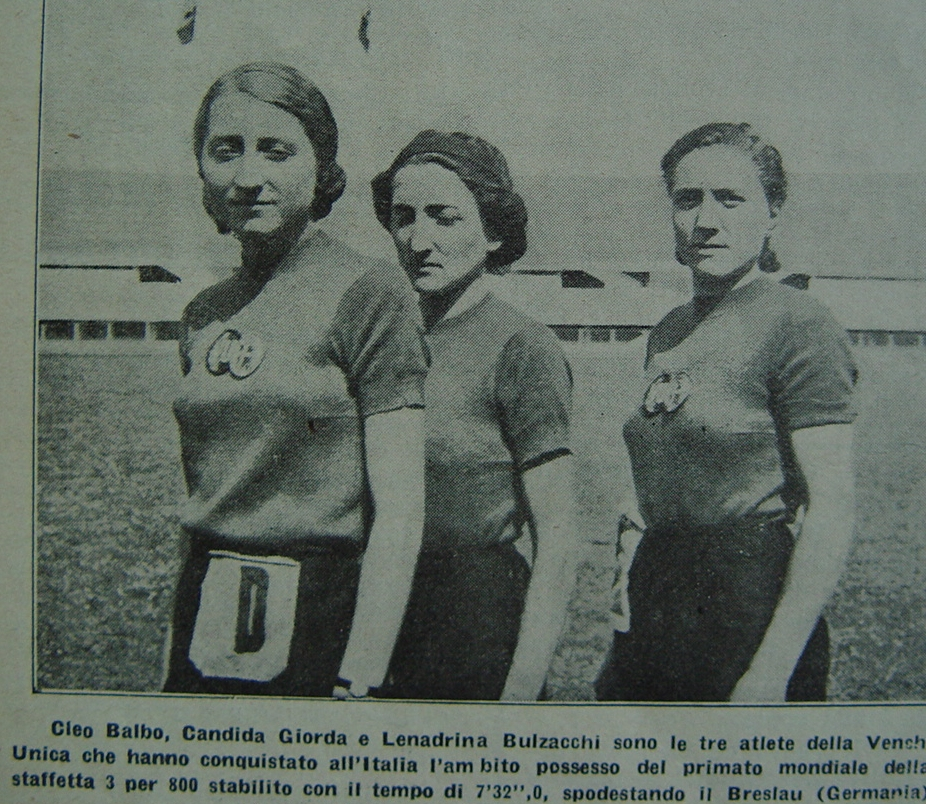 La staffetta 3×800 metri della Venchi Unica Torino che nel 1937 ottenne il record del mondo